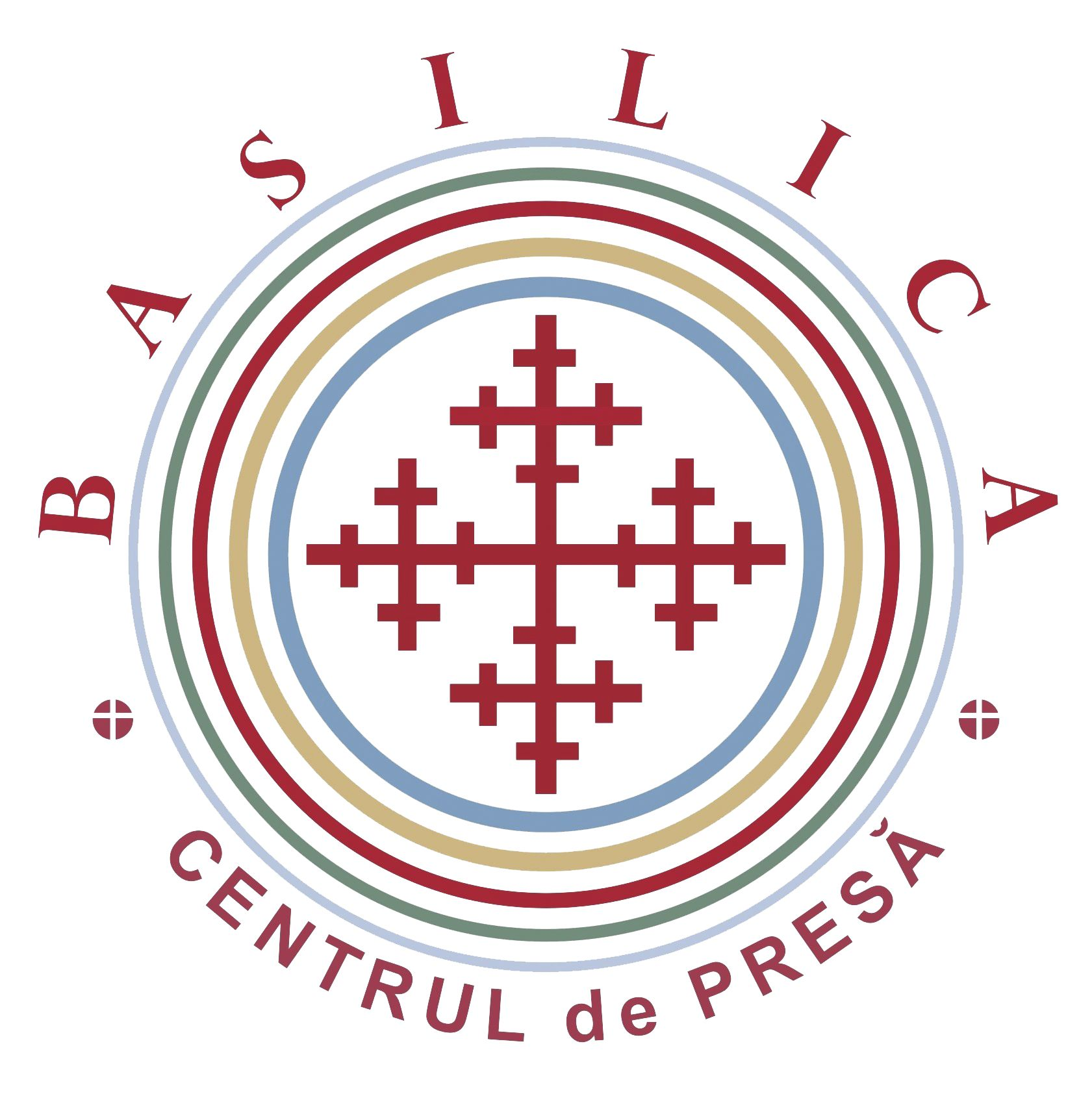 Sigla precedentă a Agenţiei de ştiri Basilica